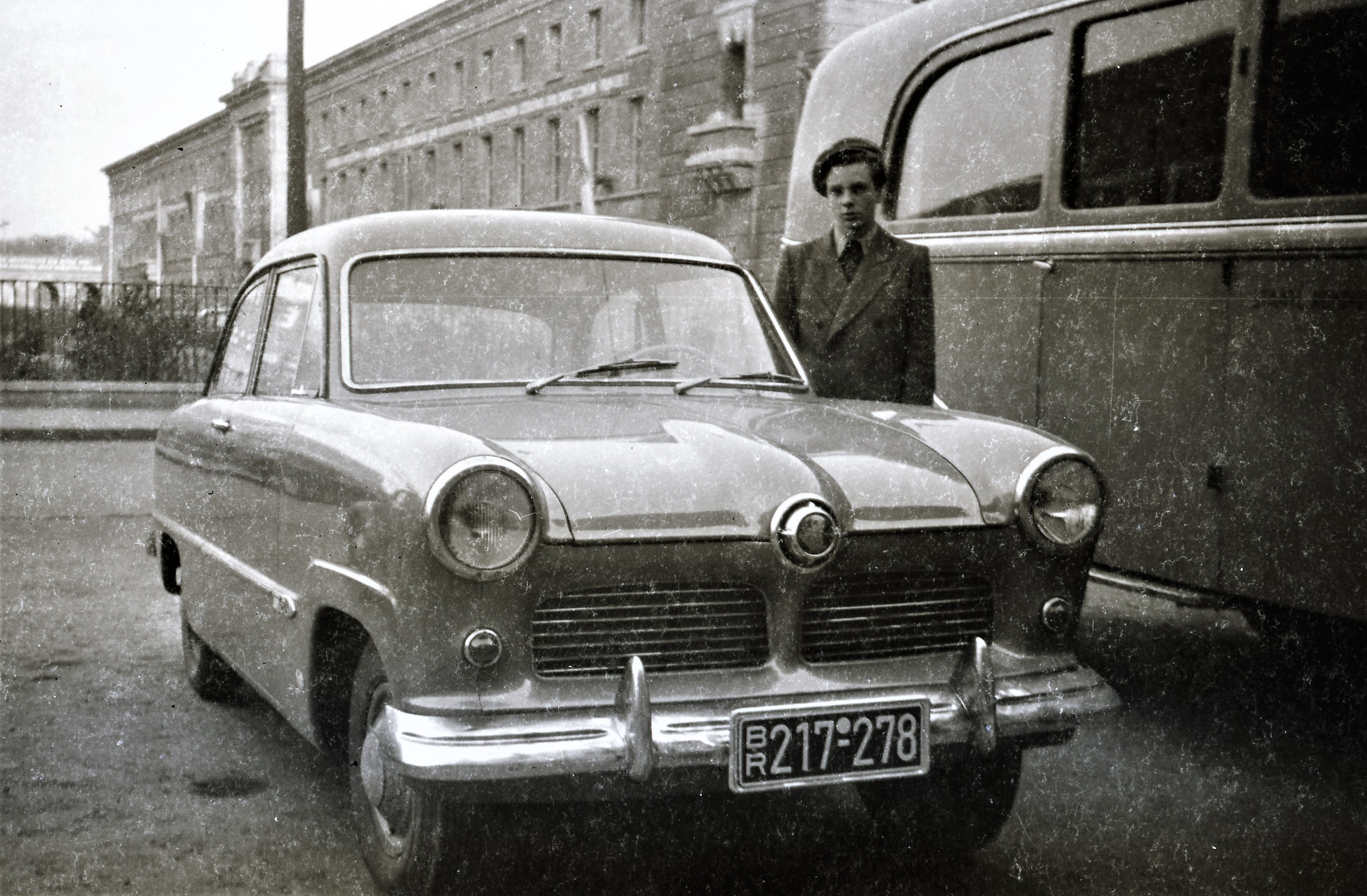 Ehemaliges Gauforum in Weimar, Sitz der Sowjetischen Militär-Administration in Thüringen, etwa 1954Das Auto ist ein Ford Taunus mit einem Nummernschild aus dem britisch besetzten Nordrhein-Westfalen.(Liste der deutschen Kfz-Kennzeichen (historisch))